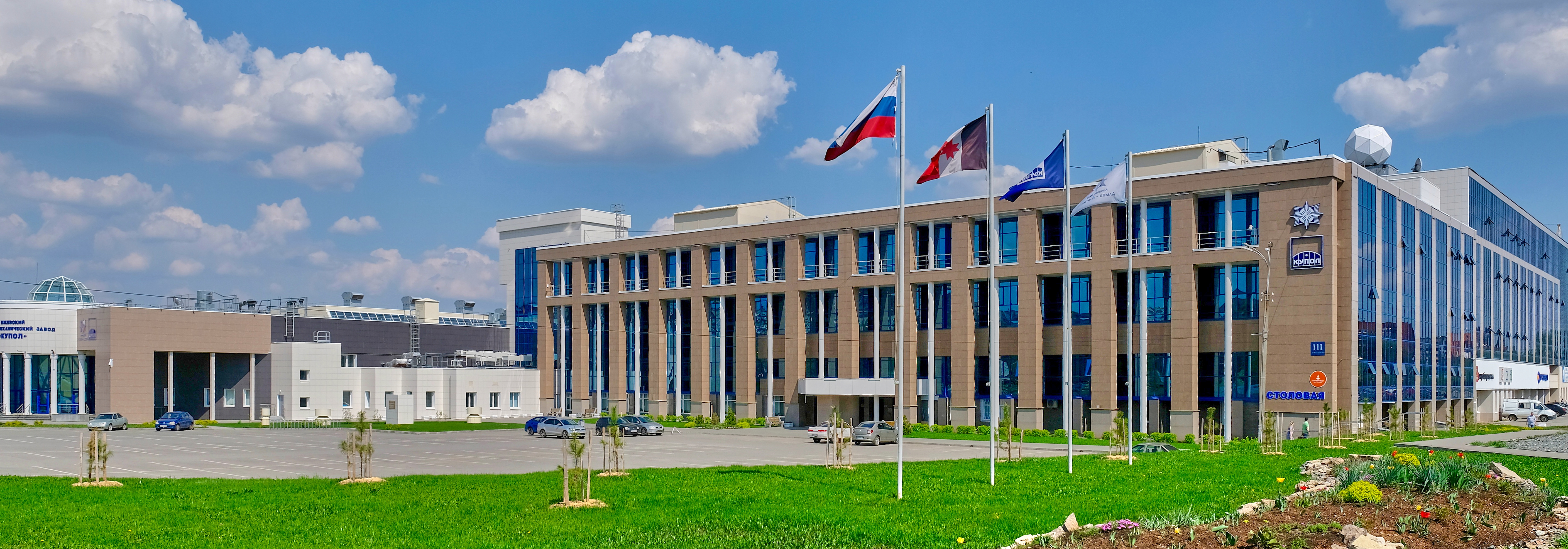 Административное здание Ижевского электро-механического завода "Купол" (ул. Молодёжная, 111)